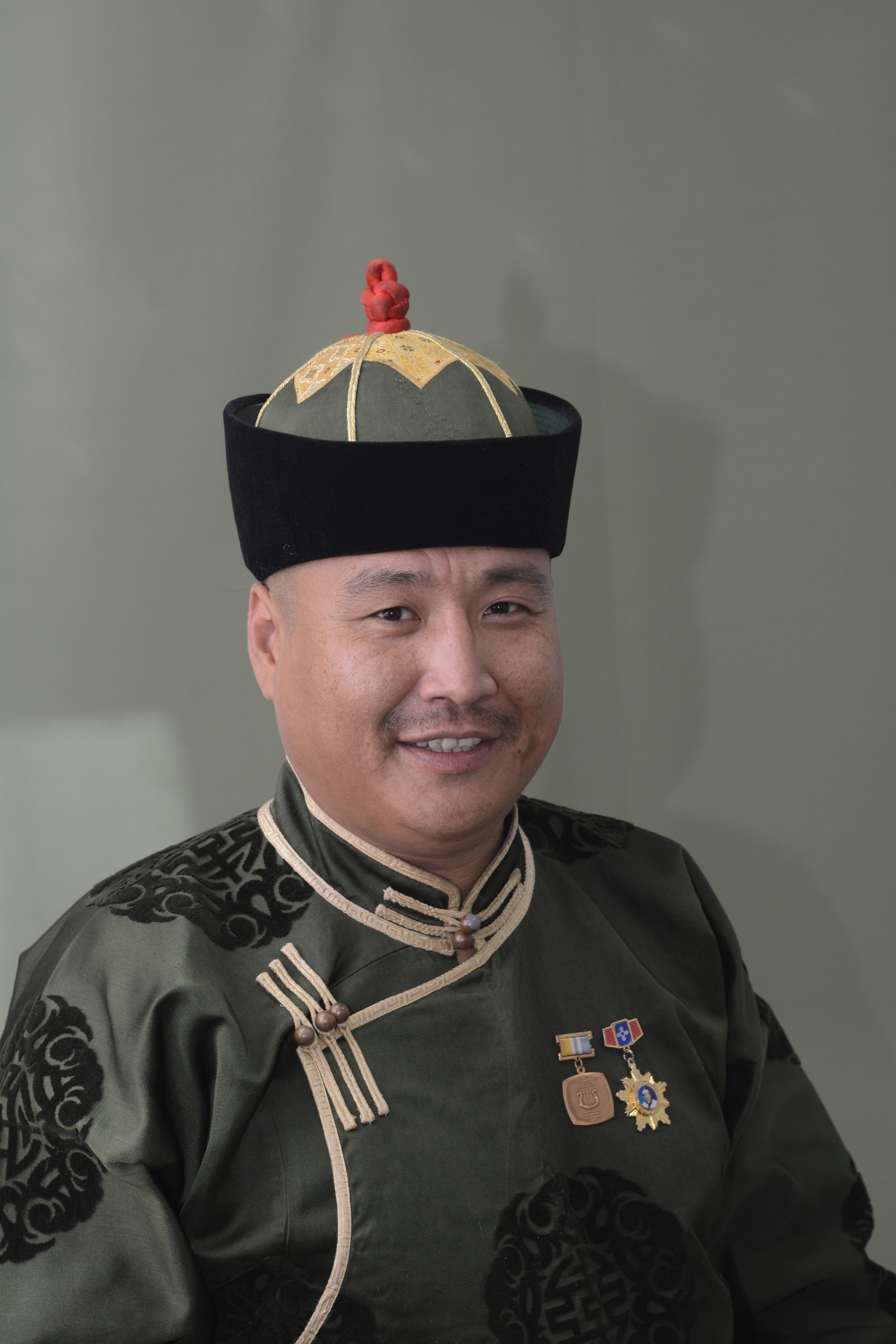 Народный Хоомейжи Республики Тыва, директор Центра Развития Традиционной Культуры и Ремесел